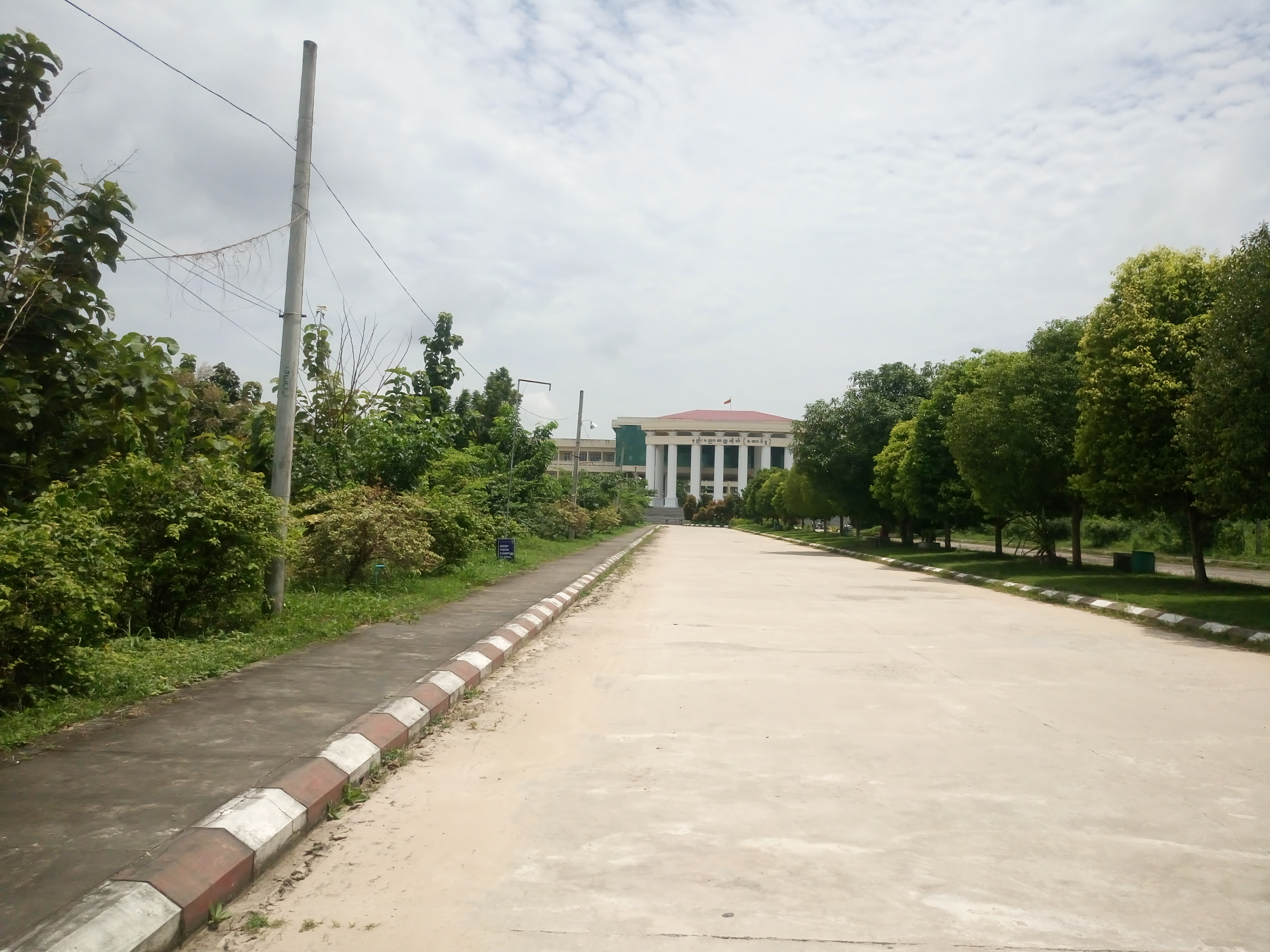 တောင်ငူနည်းပညာတက္ကသိုလ်